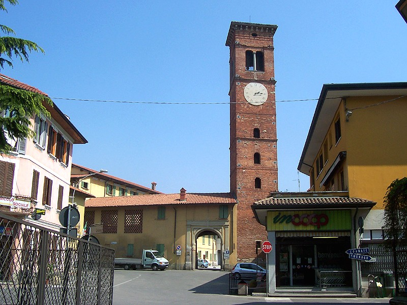 Mezzago - Torre Archinto